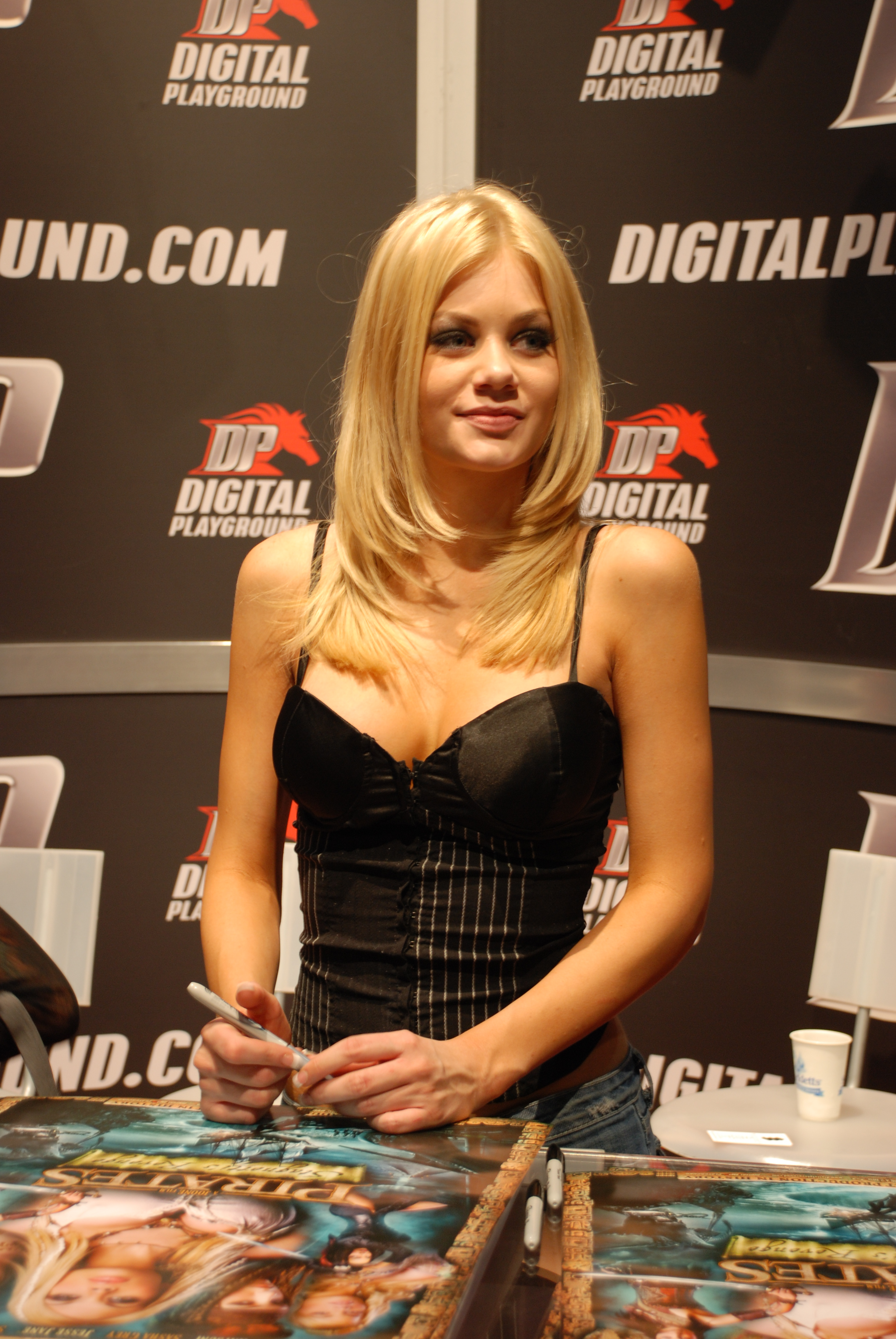 Riley Steele